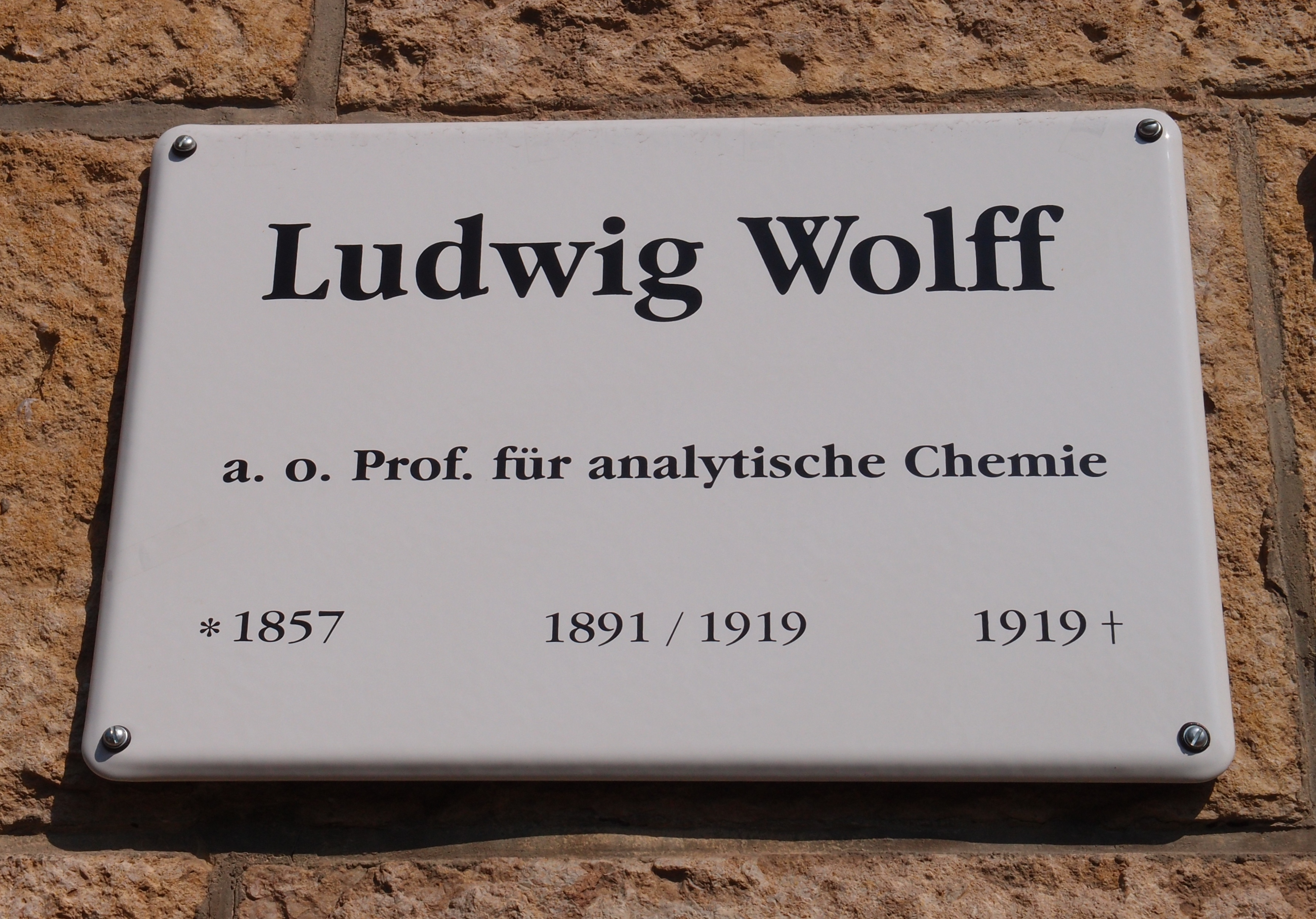 Tafel zur Erinnerung an den Chemiker Ludwig Wolff (1857-1919) in Jena, Humboldtstraße 10